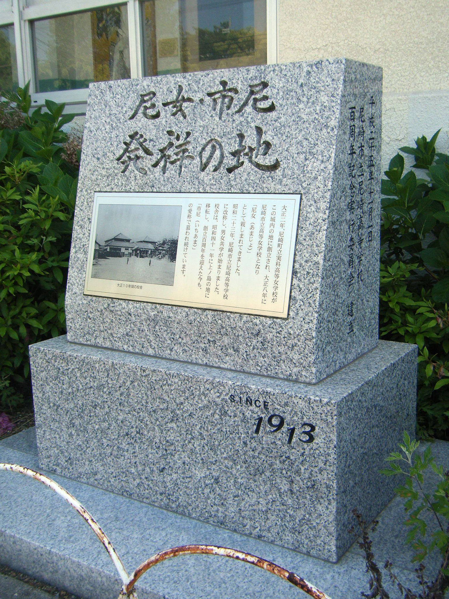 尼崎市文化財収蔵庫 旧尼崎高等女学校記念碑